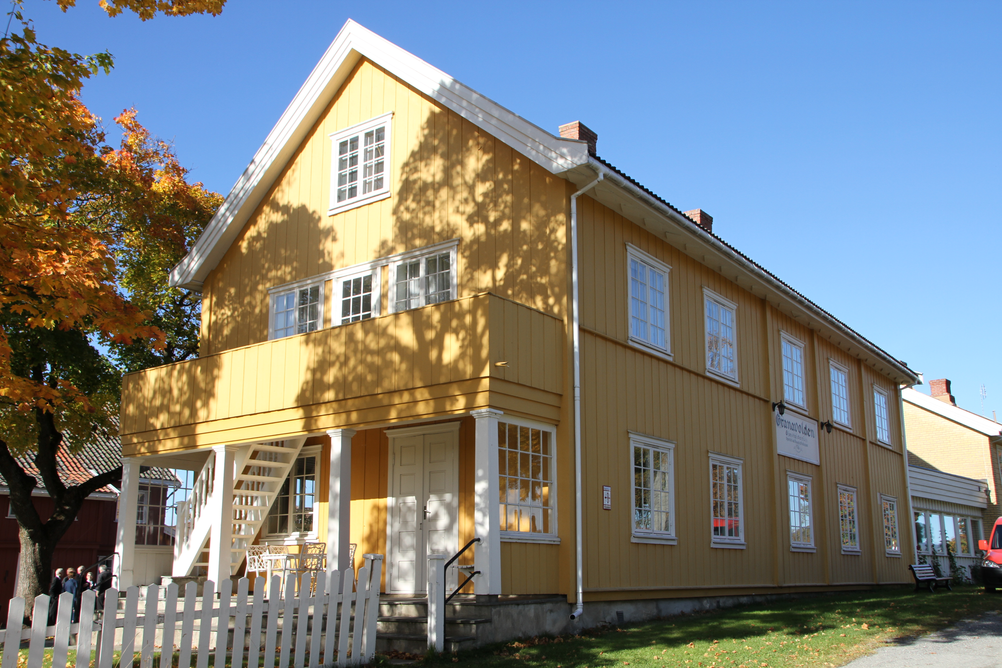 Granavolden gjästgiveri, from 1776, an inn close yto the Sister Churches, Gran, Hadeland (Oppland county, Norway).